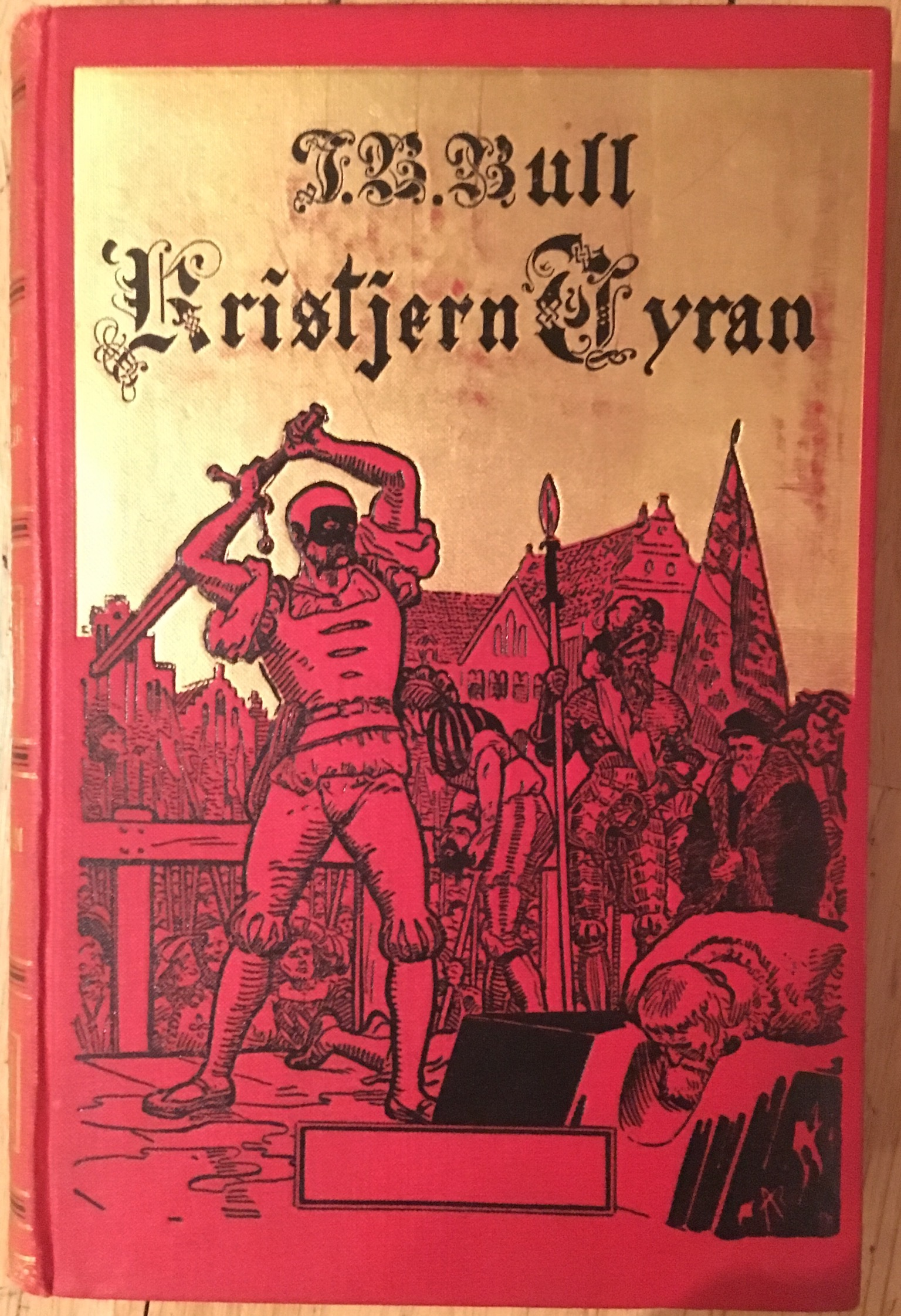 asd